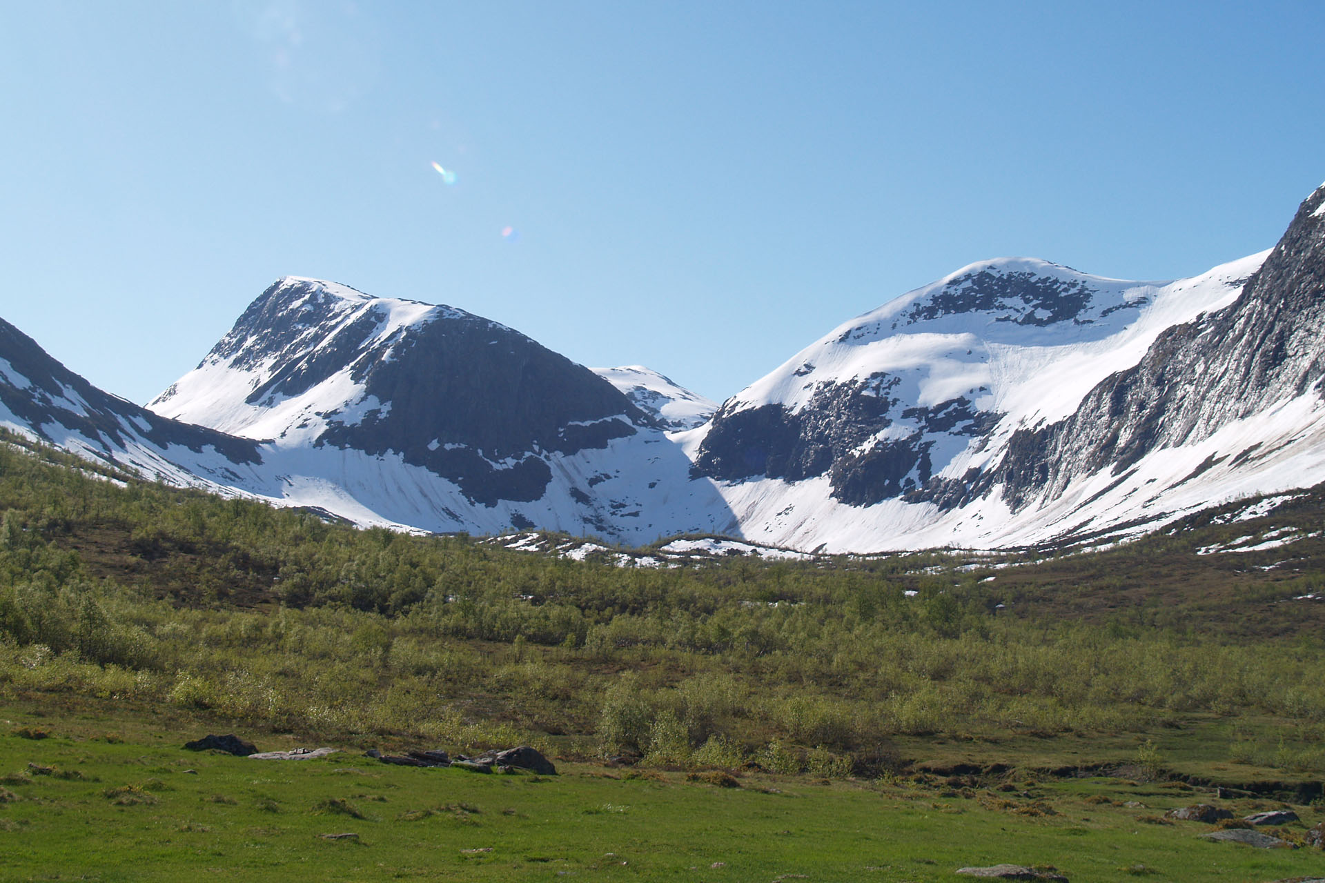 Utsikt frå Strynesætra i Knutsdalen, Hornindal. Steindalsegga til venstre i bildet.